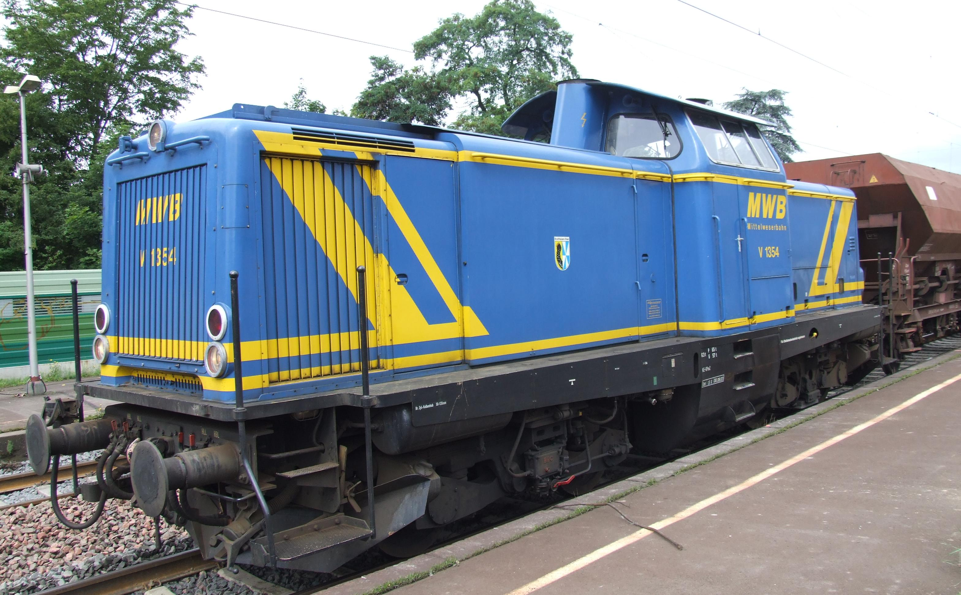 V 1354 (ex DB 213 341 1, ex V 100 2341) der Mittelweserbahn bei Gleisbauarbeiten in Königswinter